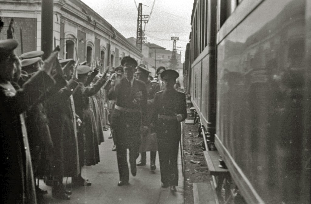 Título original: Recibimiento a oficiales alemanes en la estación del Norte (8/10) Localización: San Sebastián (Guipúzcoa)